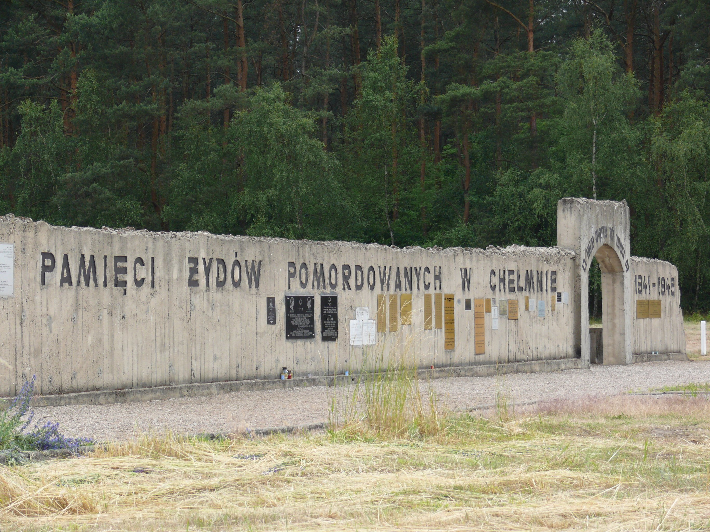 "Ściana pamięci" na terenie obozu zagłady Kulmhof w Chełmnie nad Nerem